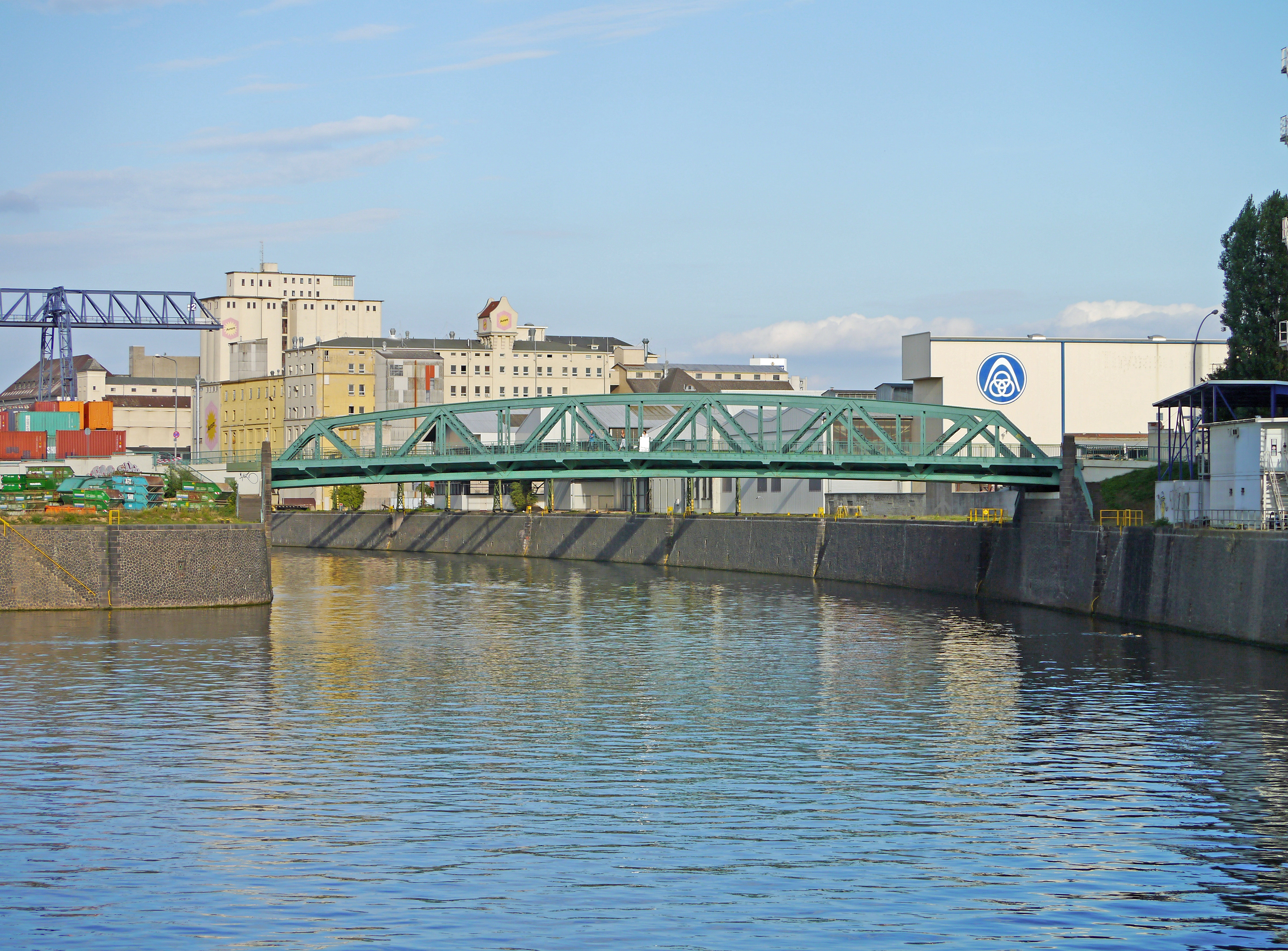 Schmickbruecke (2012) ueber dem Suedbecken des Osthafens I, in Frankfurt am Main.